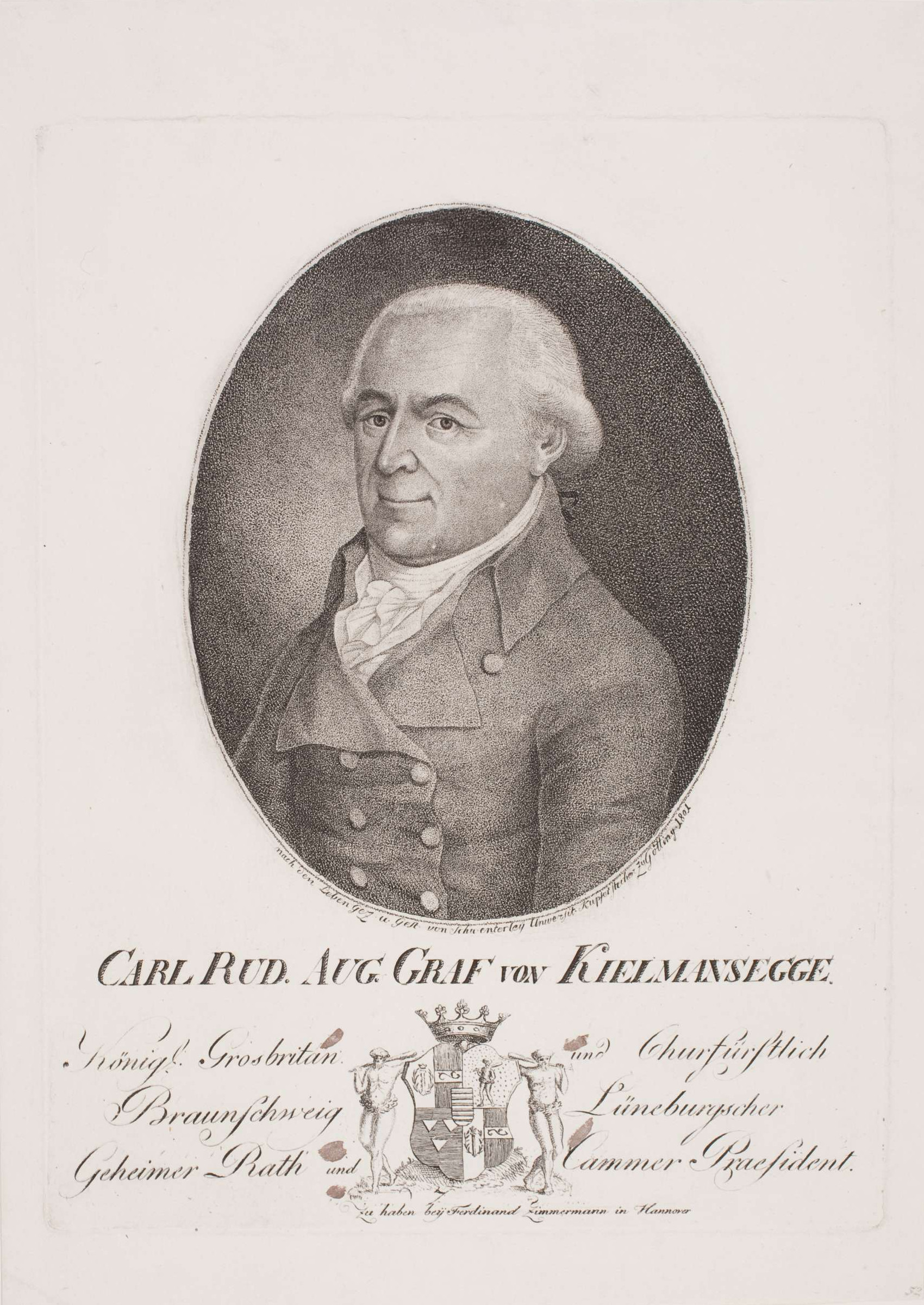 Karl Rudolf August Graf von Kielmannsegg (1731-1810), Kgl. großbritann. u. kurfürstl. hannov. Geh. Rat u. Kammerpräsident in Hannover; Freimaurer; Porträtstich von Heinrich Schwenterley